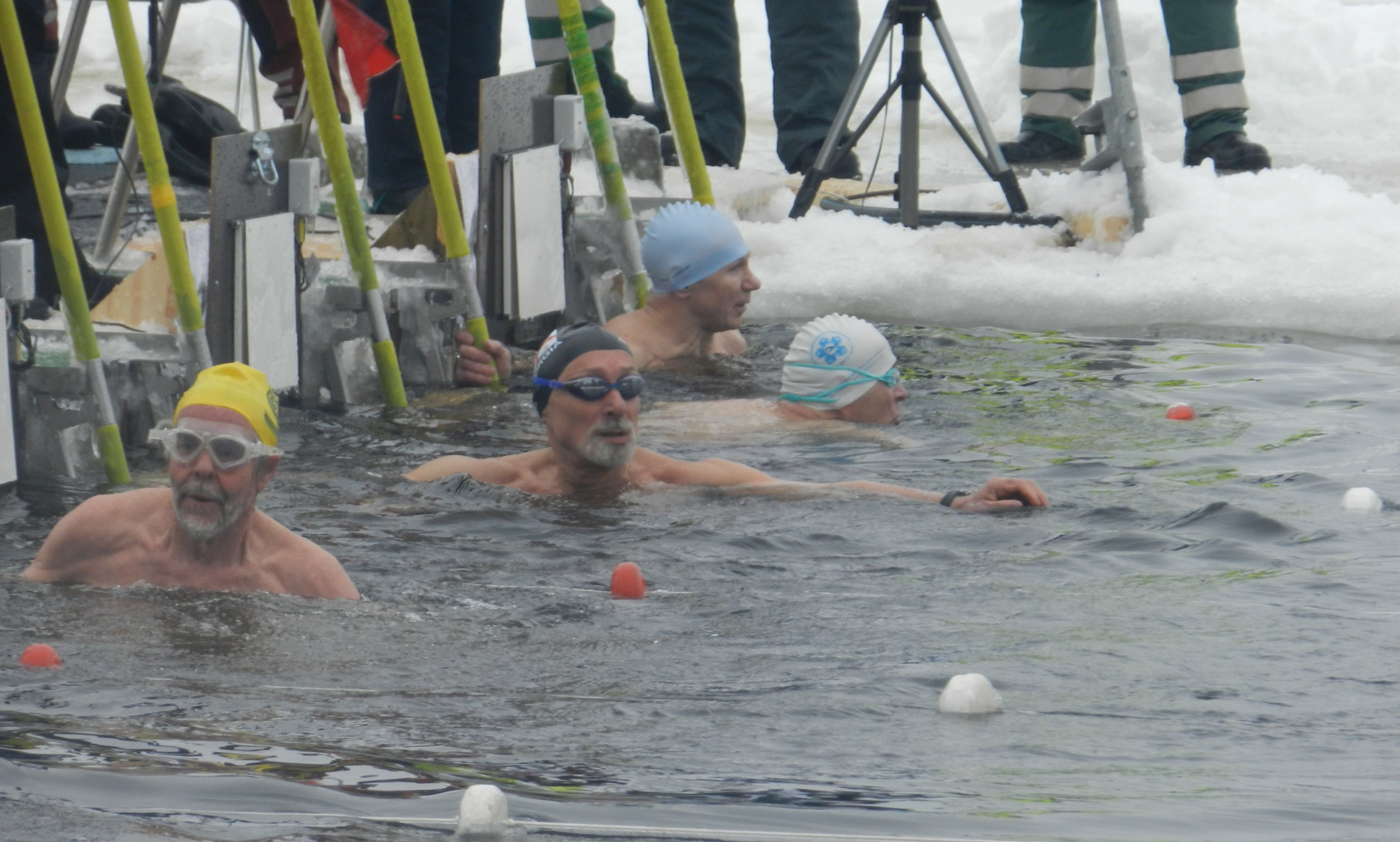 Чемпионат мира по зимнему плаванию в 2014 году - Рованиеми, Финляндия